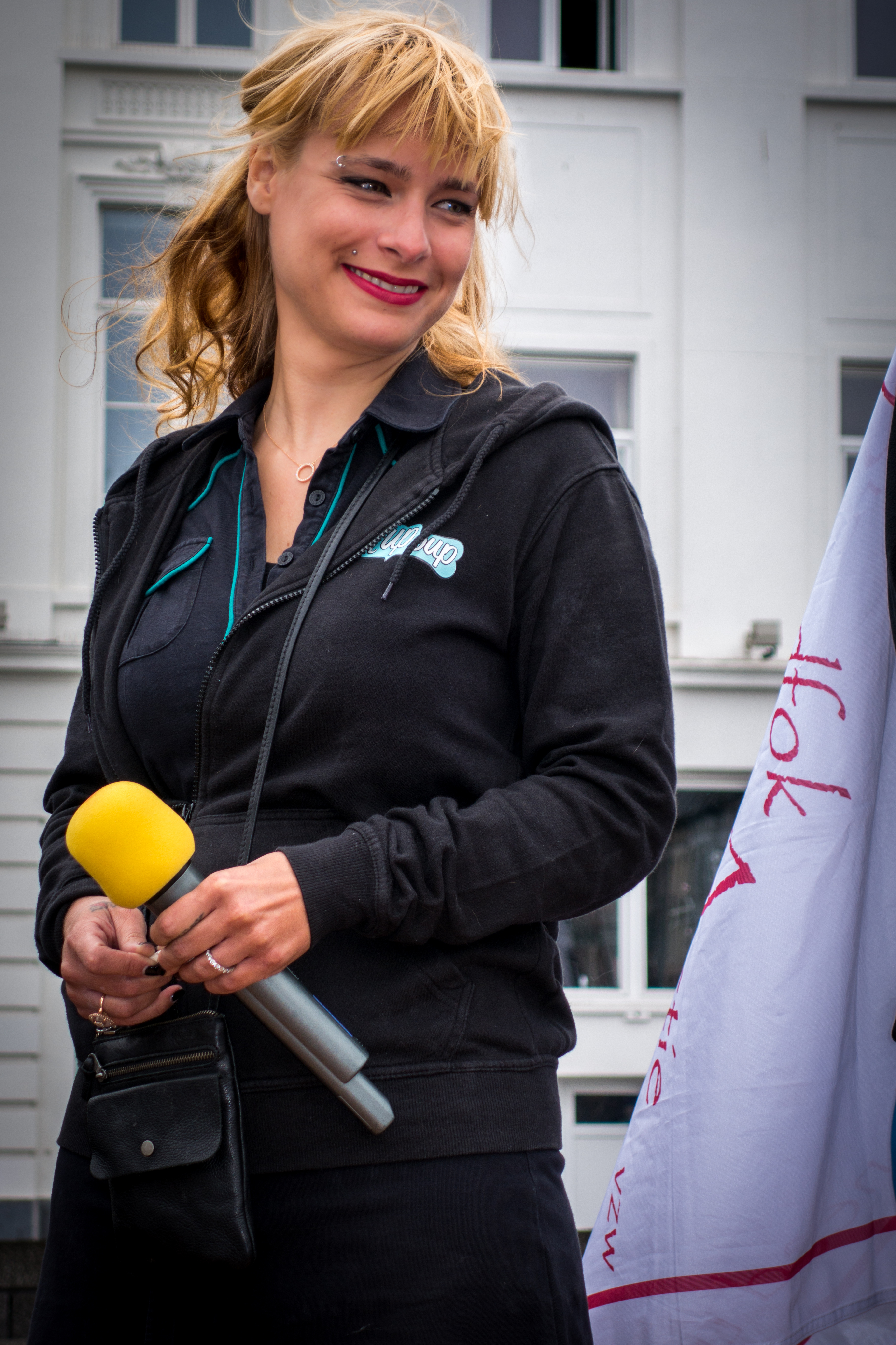 An Lemmens. Foto genomen tijdens de optocht van dierenwelzijn op 26 april 2014 in Gent, België.